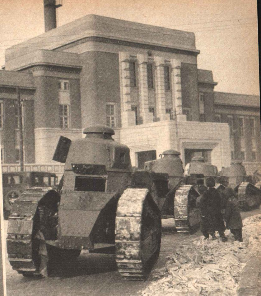 九一八事變後，被日軍擄獲的FT-17。